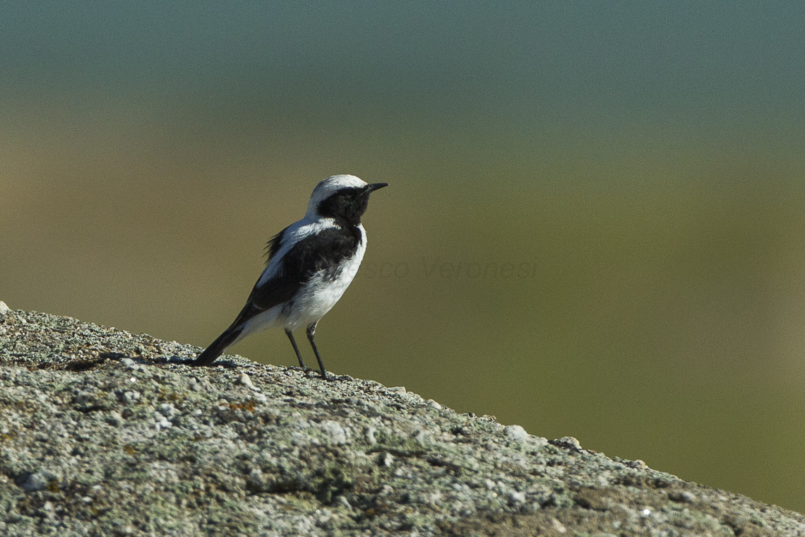 Finsch's Wheatear - Uzbekistan_S4E8762